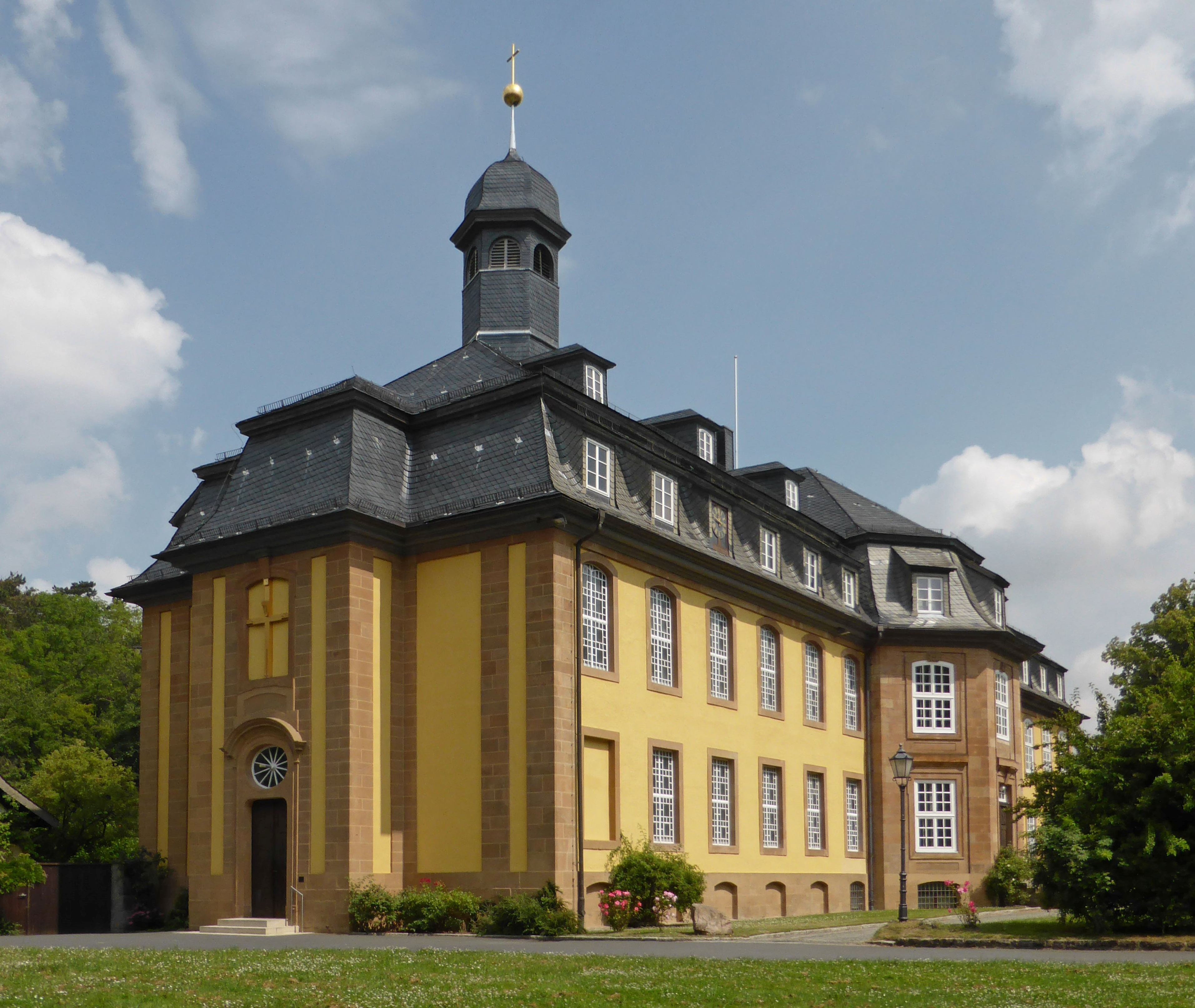 Liebenburg, kath. Schlosskirche Mariä Verkündigung